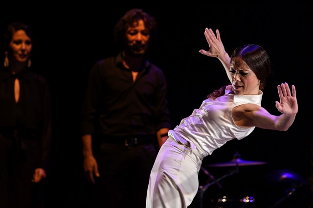 Olga Pericet bailando